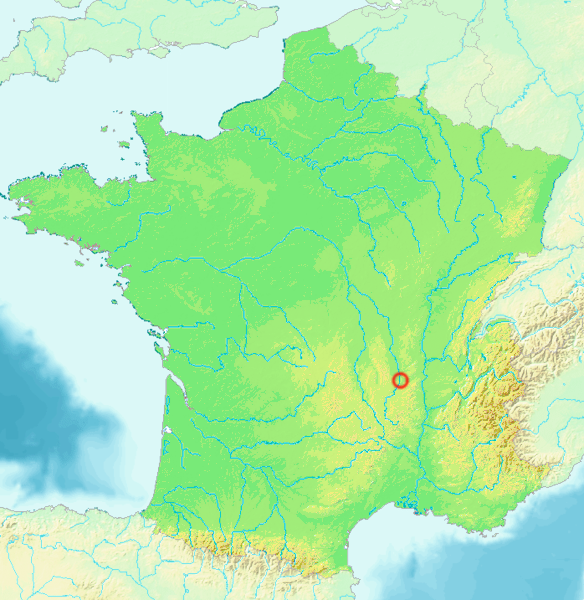 carte de Saint Etienne provenant de [Image:France géoloc.png]